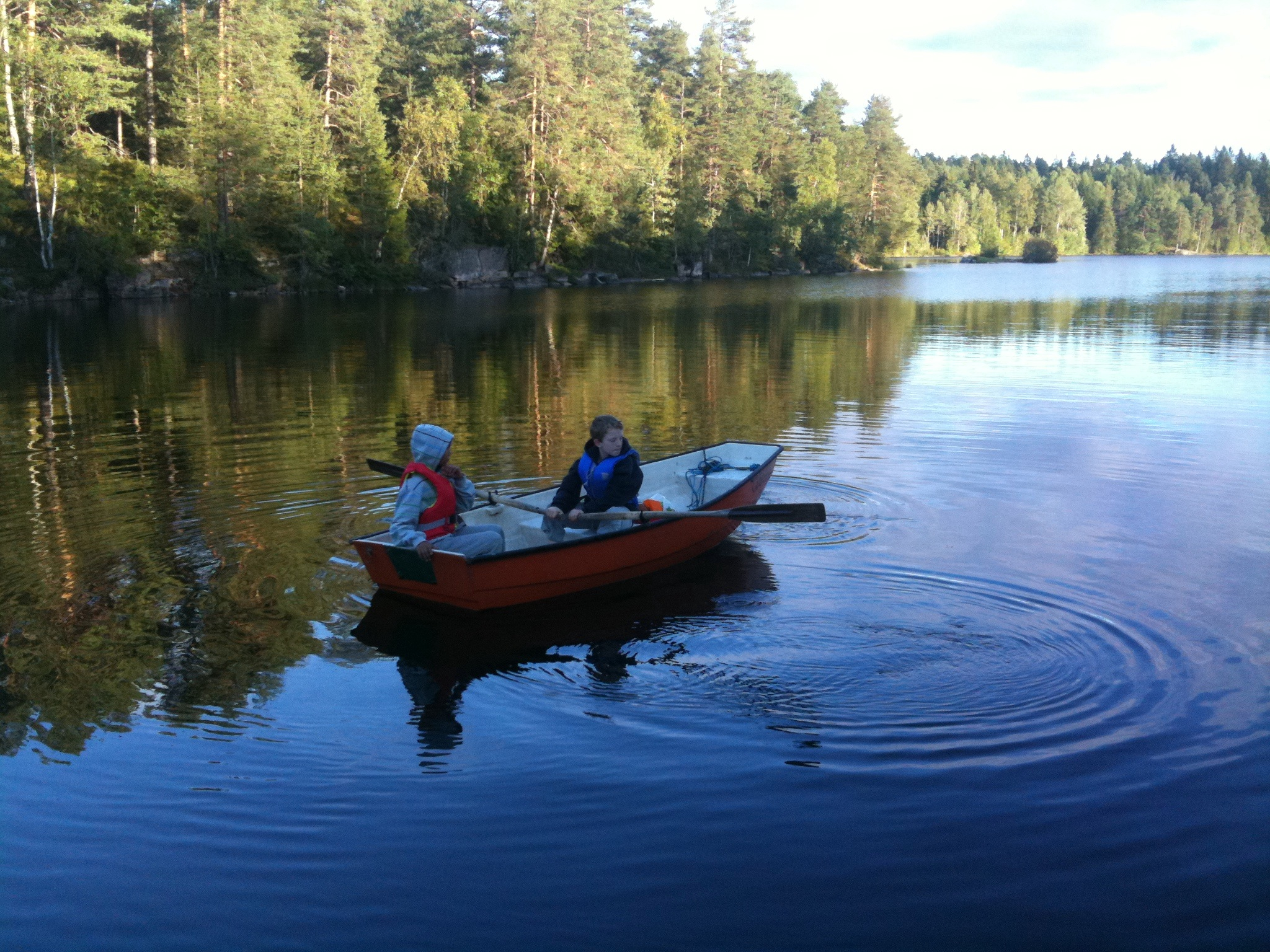 Robåt på Nordvannet i Asker